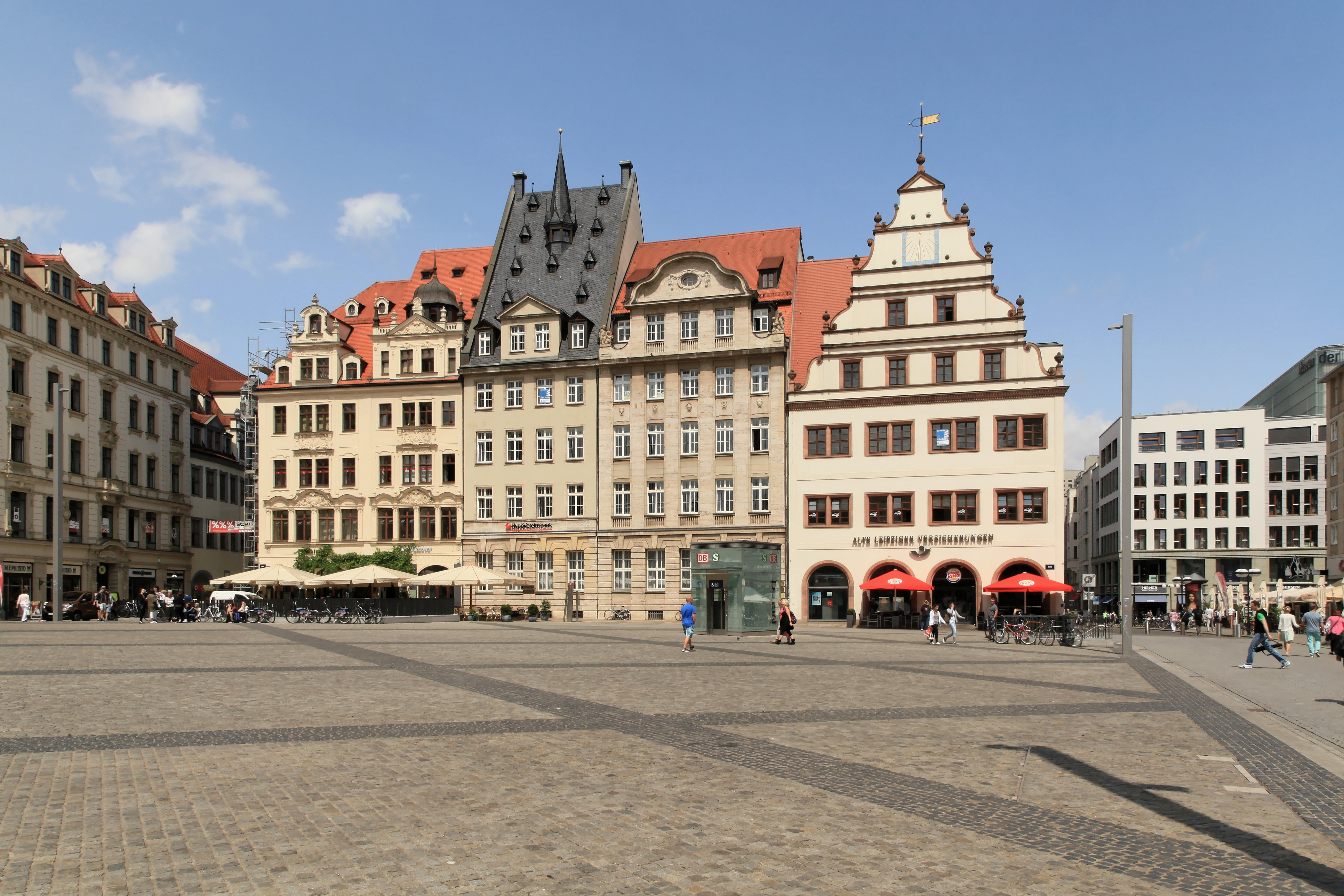 Markt mit Haus Nr. 4 (Alte Waage), 5, 6 und 7 in Leipzig